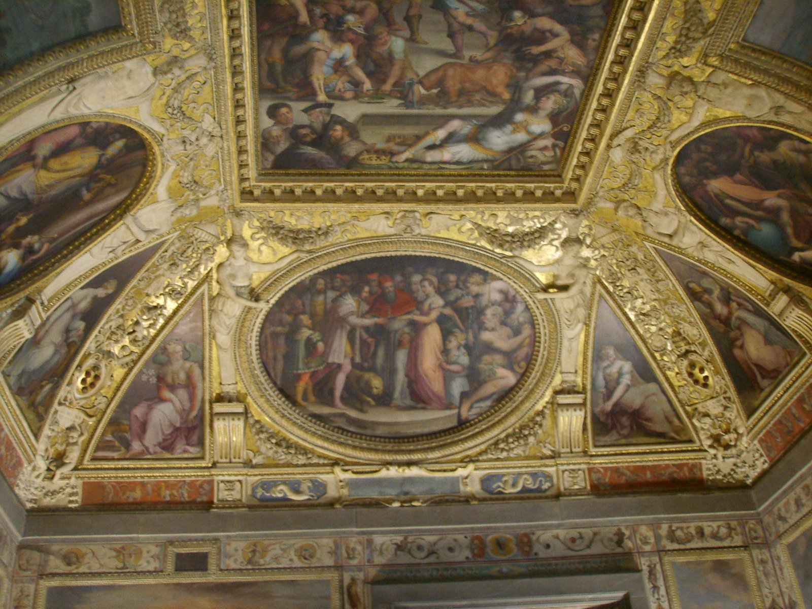 Sala di Clemente VII, Sposalizio di Caterina de' Medici con Enrico II di Francia